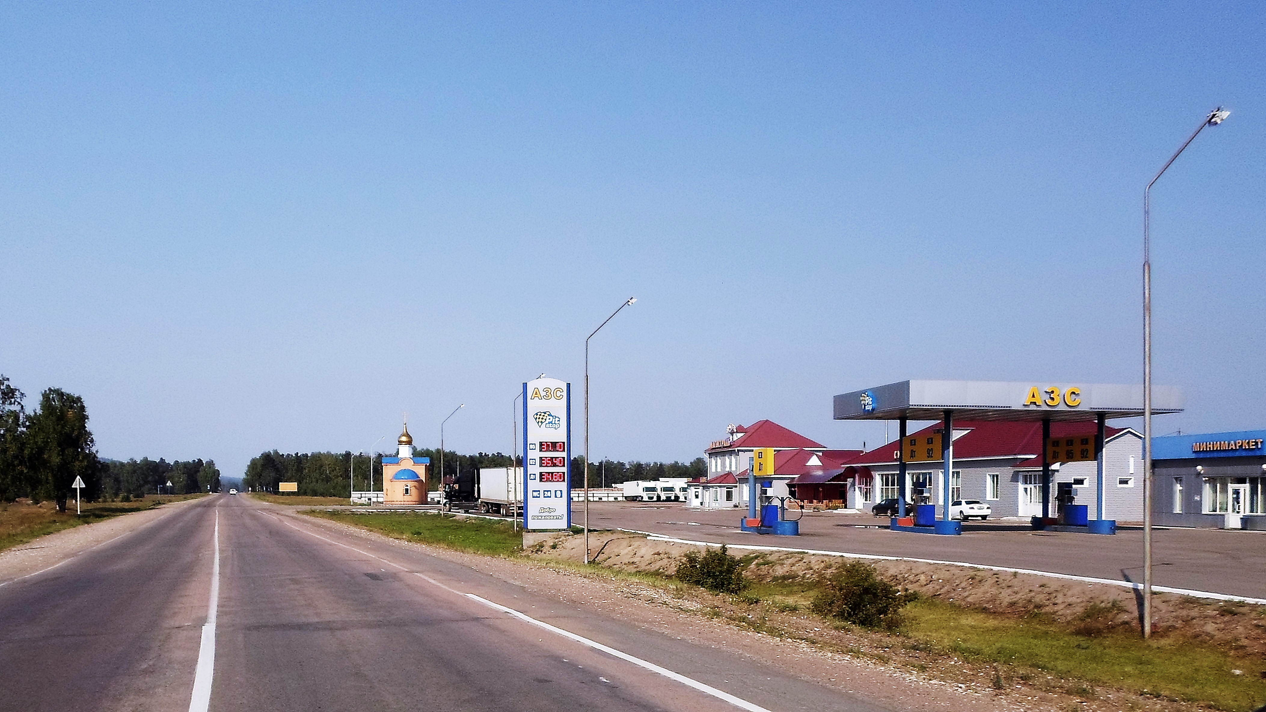 Федеральная автомагистраль Р258 "Байкал" (М55) в западной части села Ильинка Прибайкальского района Бурятии.